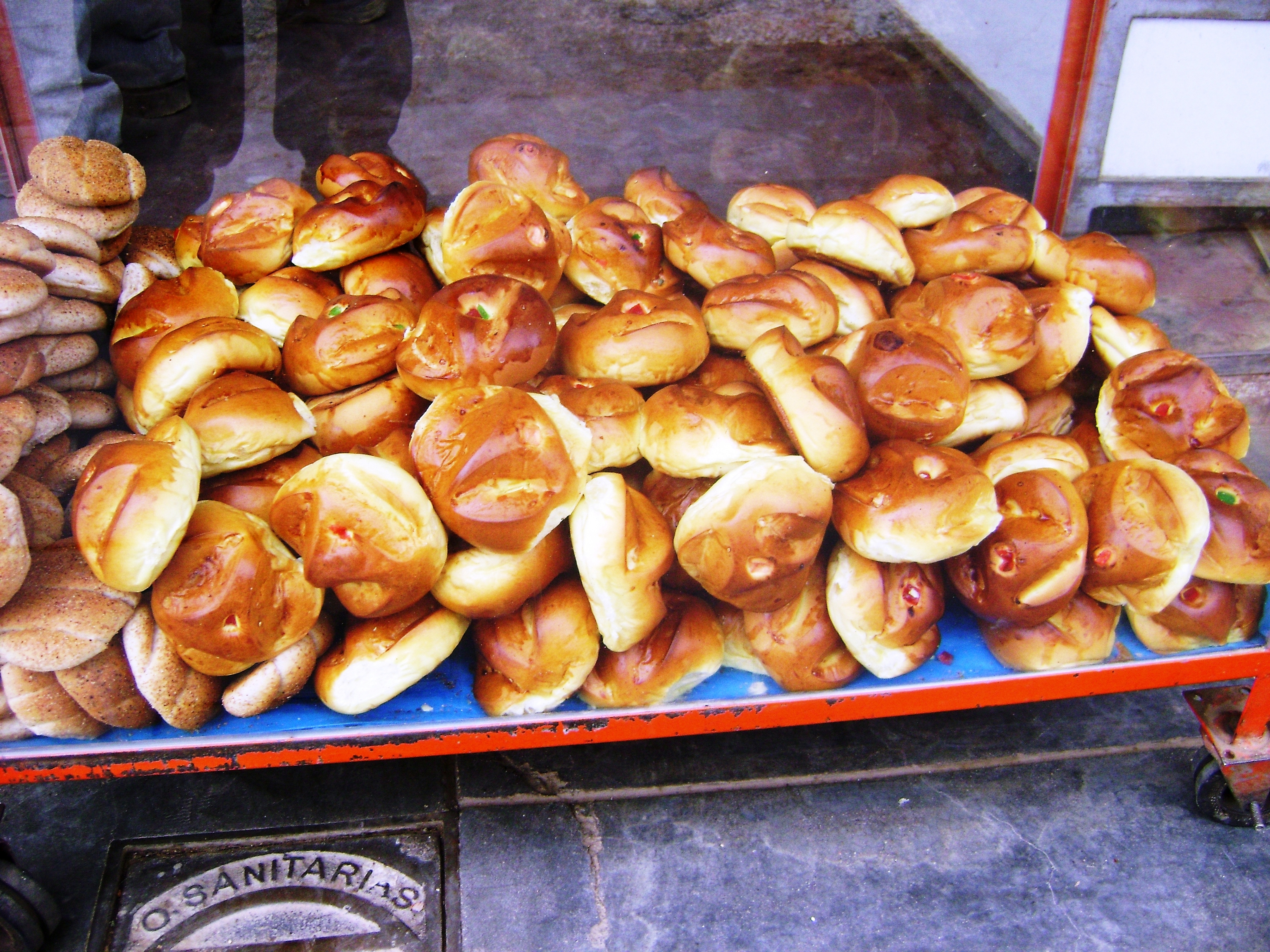 Pan dulce. Concepción, Junín, Perú.